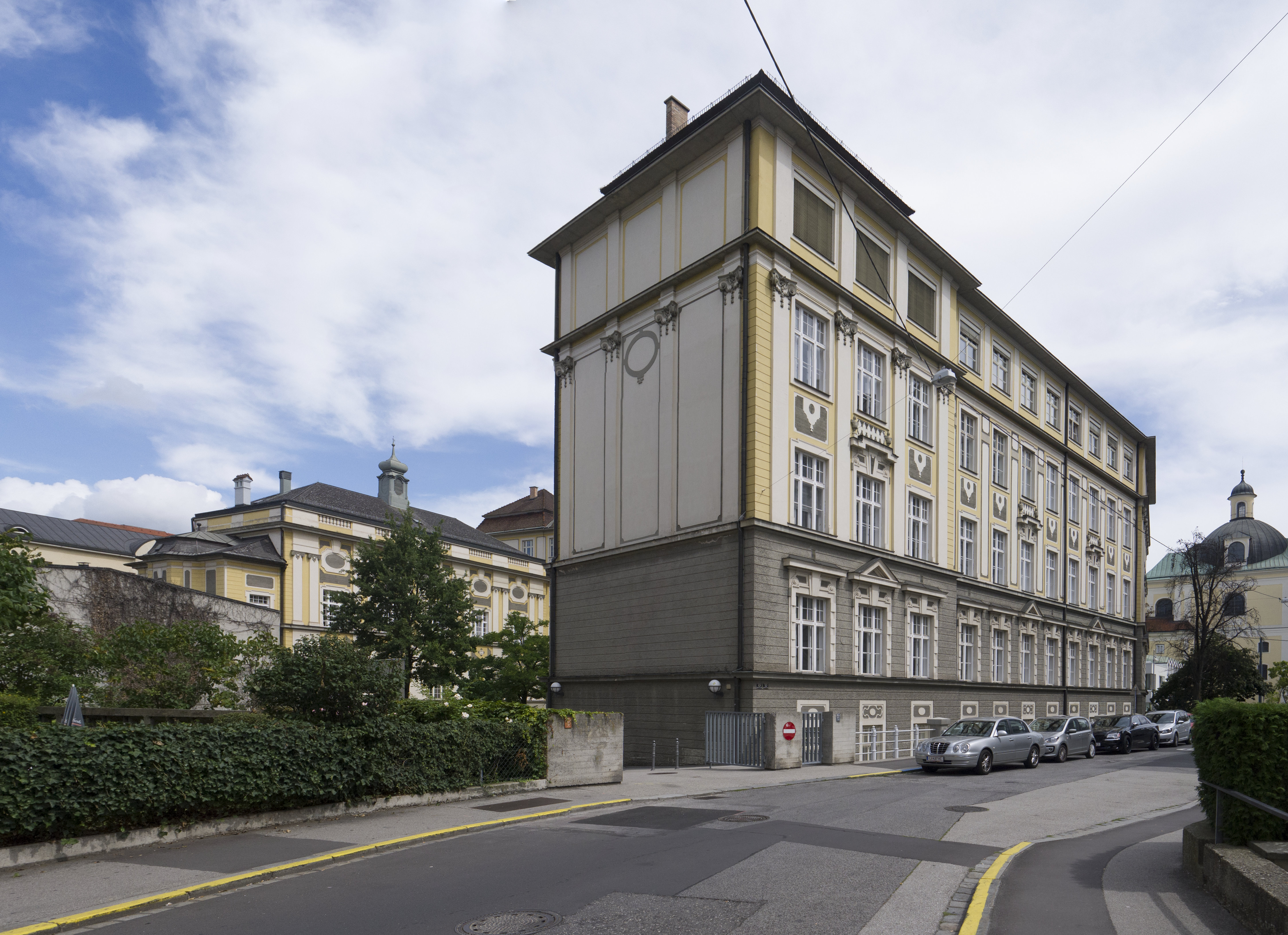 Bundesrealgymnasium